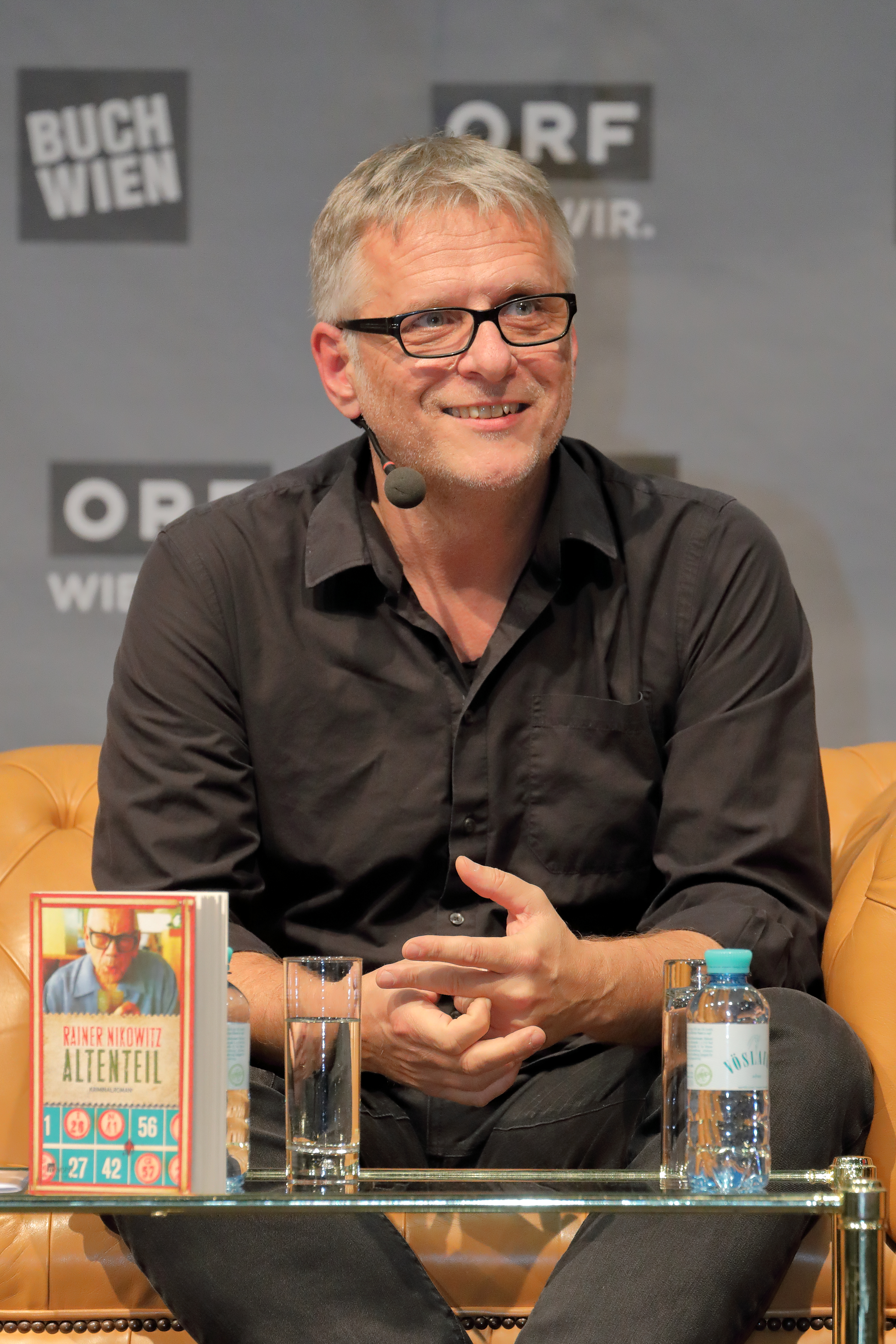 Der österreichische Journalist und Autor Rainer Nikowitz bei der Präsentation seines Buches „Altenteil“ auf der ORF-Bühne der Wiener Buchmesse 2018.